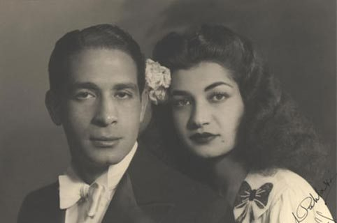 Ashraf Pahlavi et son deuxième mari Ahmad Shafigh